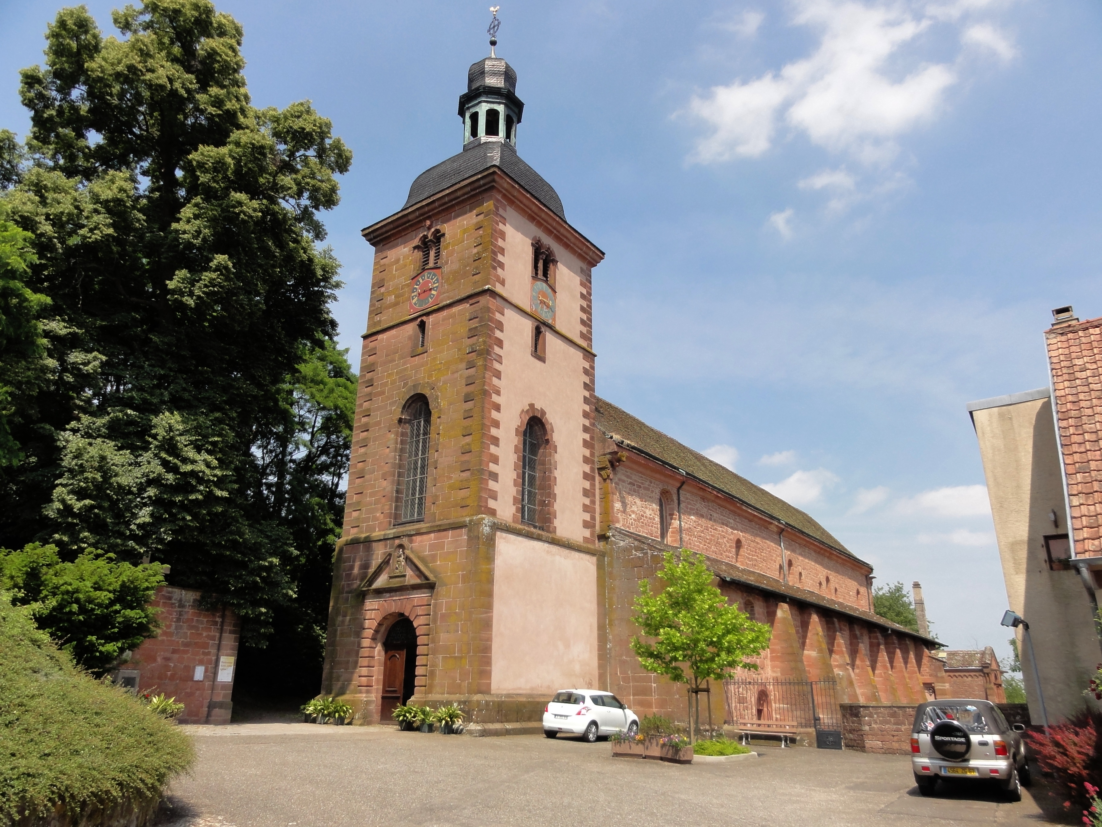 Alsace, Bas-Rhin, Saint-Jean-Saverne, Église abbatiale Saint-Jean-Baptiste (PA00084921, IA00055618).